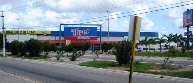 Hiper Bompreço Ponta Negra em Natal, Rio Grande do Norte, Brasil